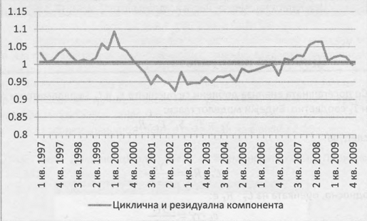 Движењето на цикличната и резидуалната компонента на реалнито бруто домашен производ